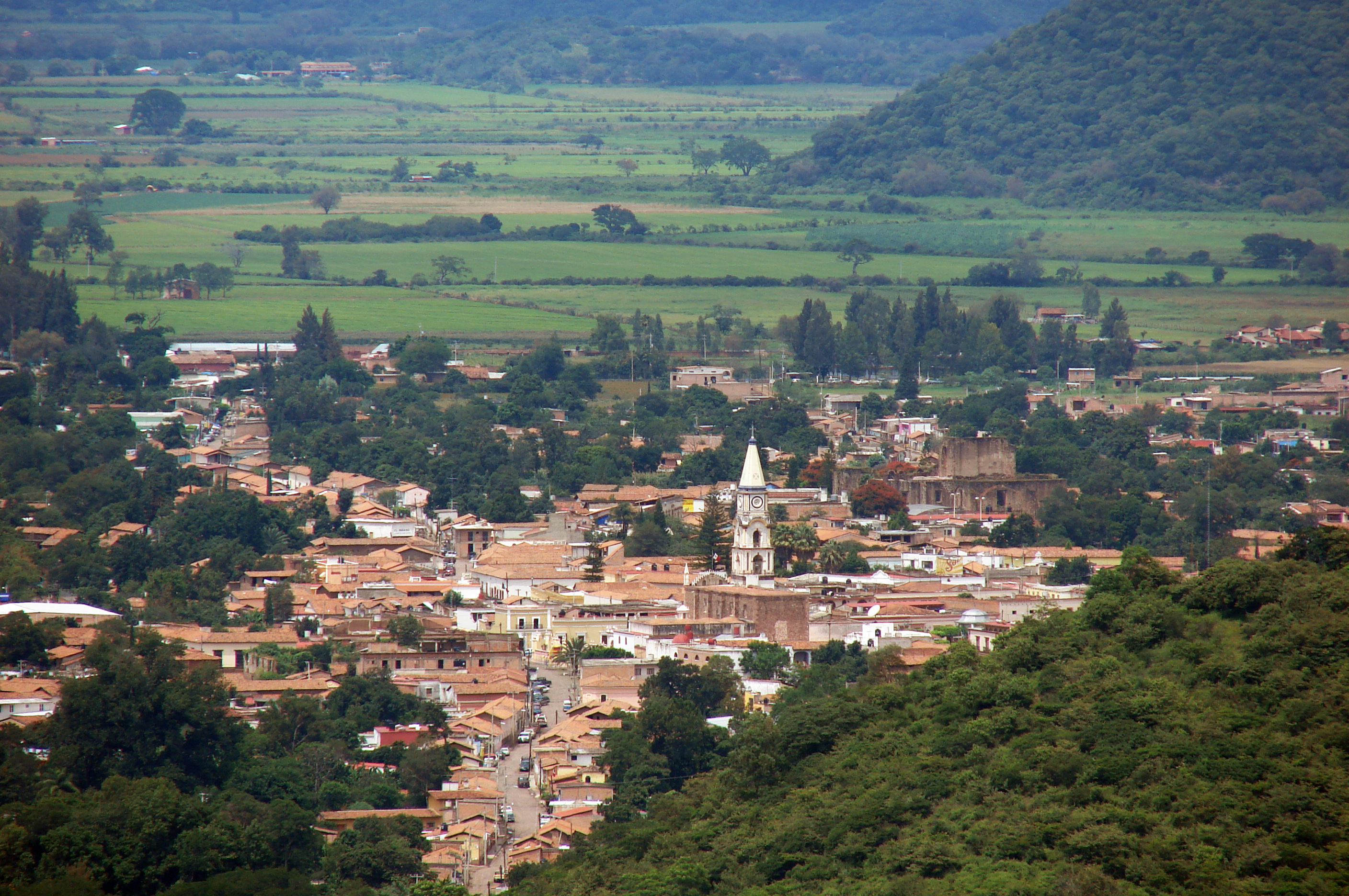 Pueblo de Mascota